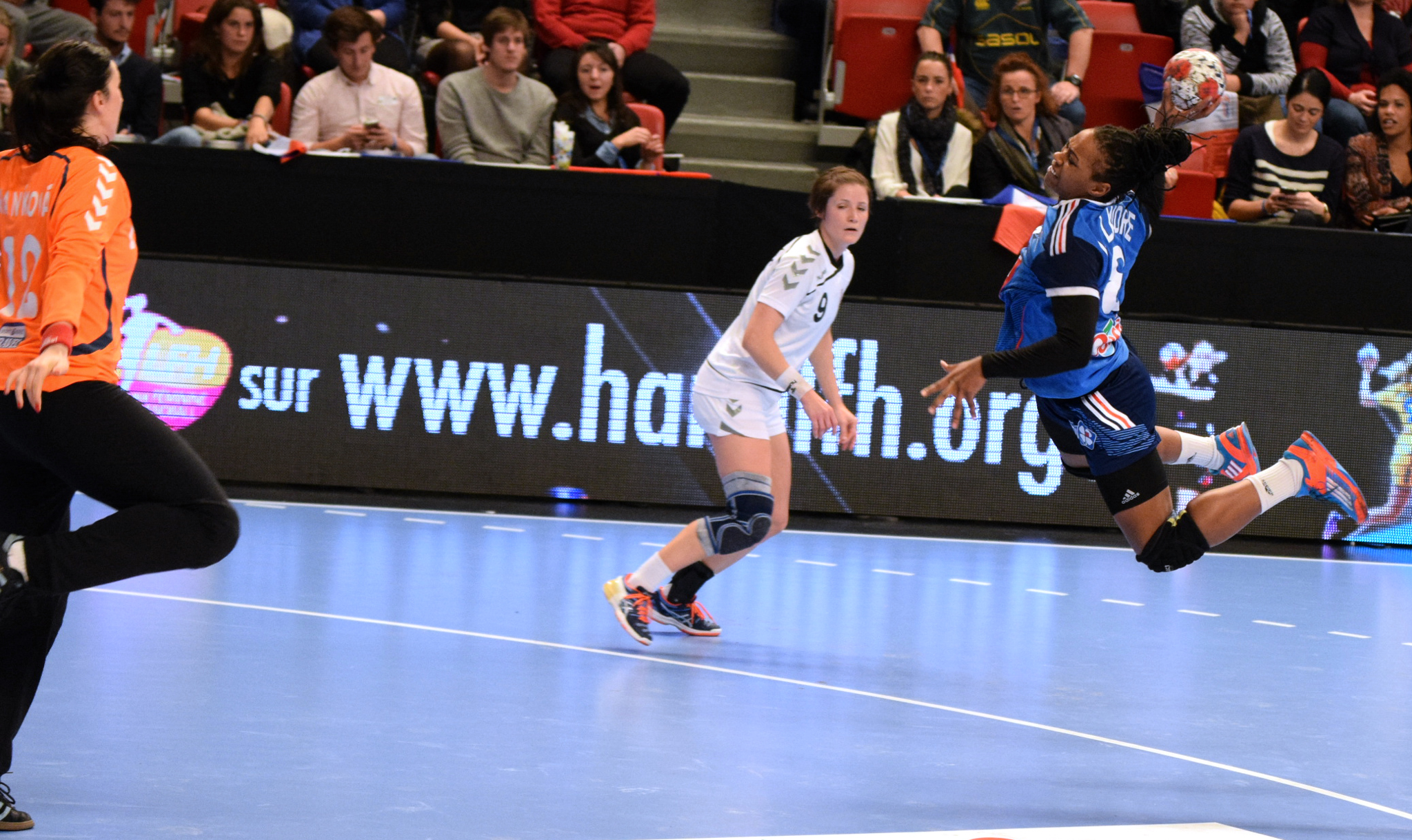 Laurisa Landre ,le 29 novembre 2015, lors du match France / République Tchèque pour le compte du TIPIFF 2015. Au stade Pierre de Coubertin à Paris.